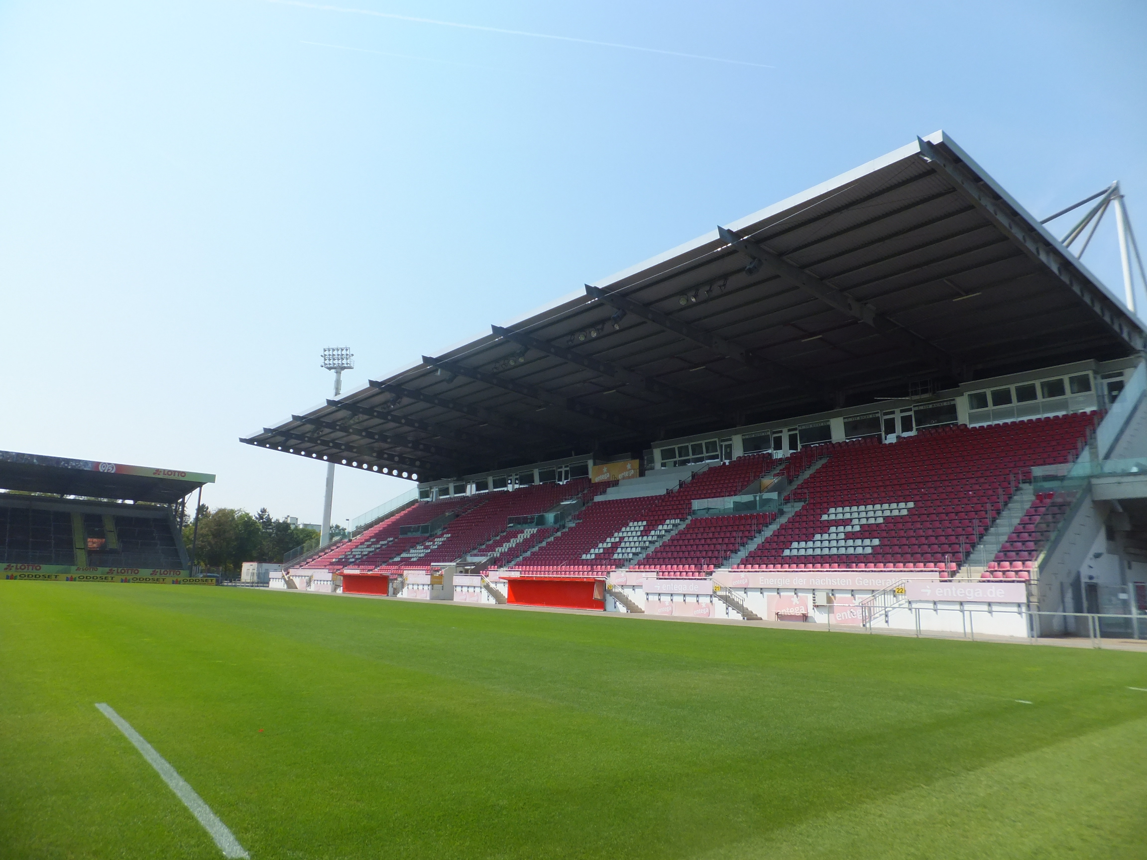 Haupttribüne des Stadions am Bruchweg in Mainz